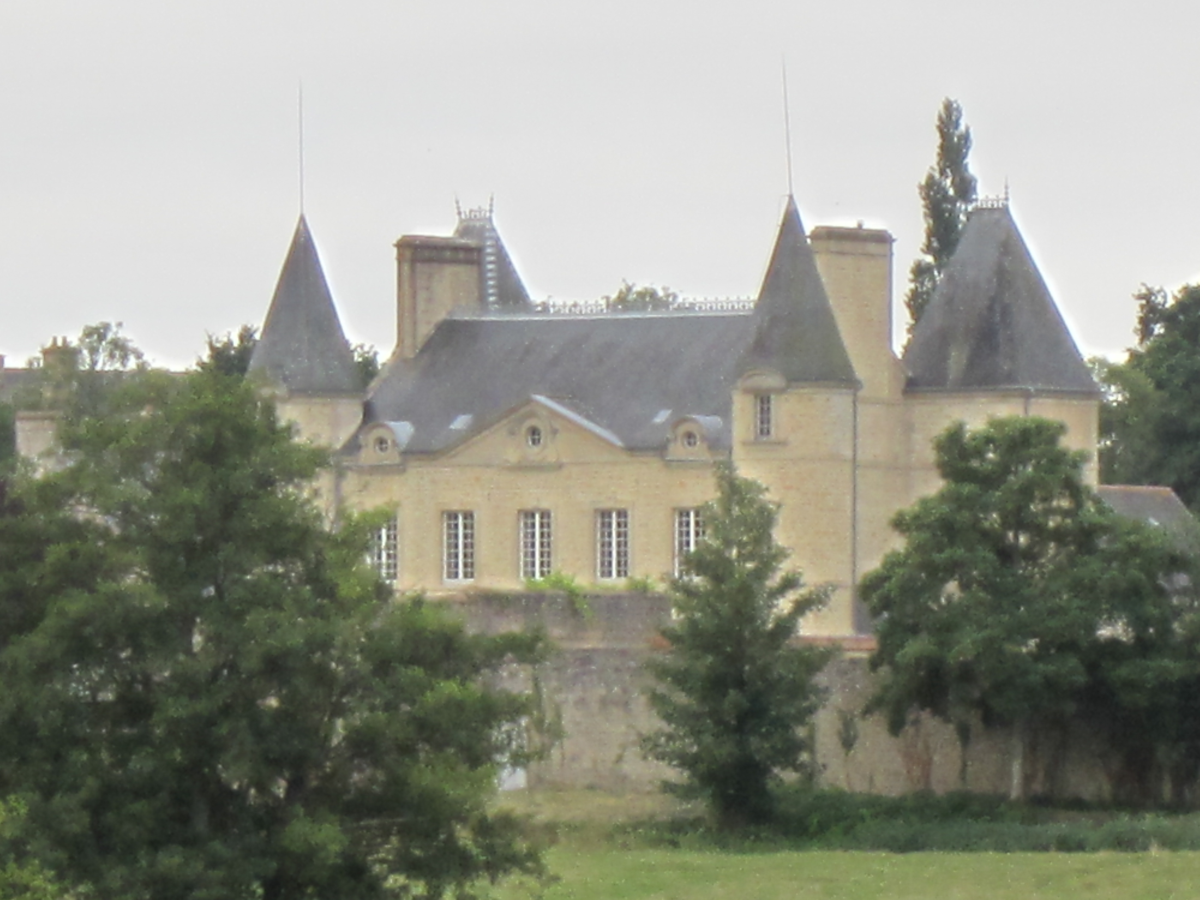 Négreville, Manche